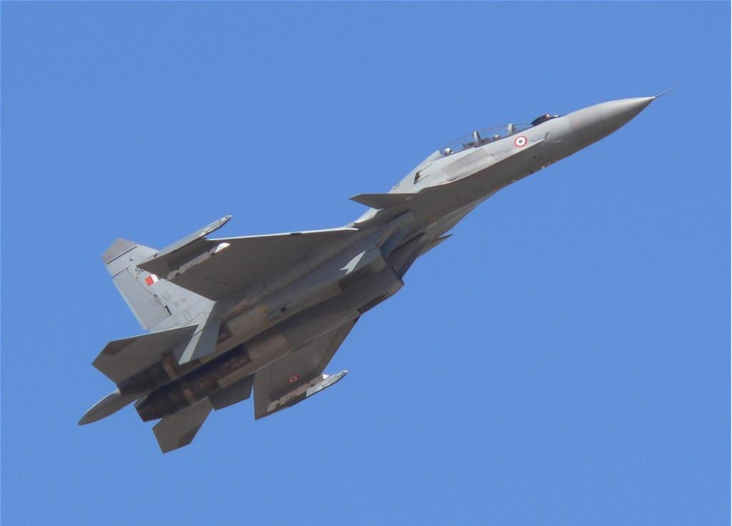 IAF Su-30 MKI, taken during aero-India bangalore.